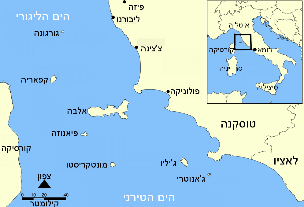 הארשיפלג הטוסקאני